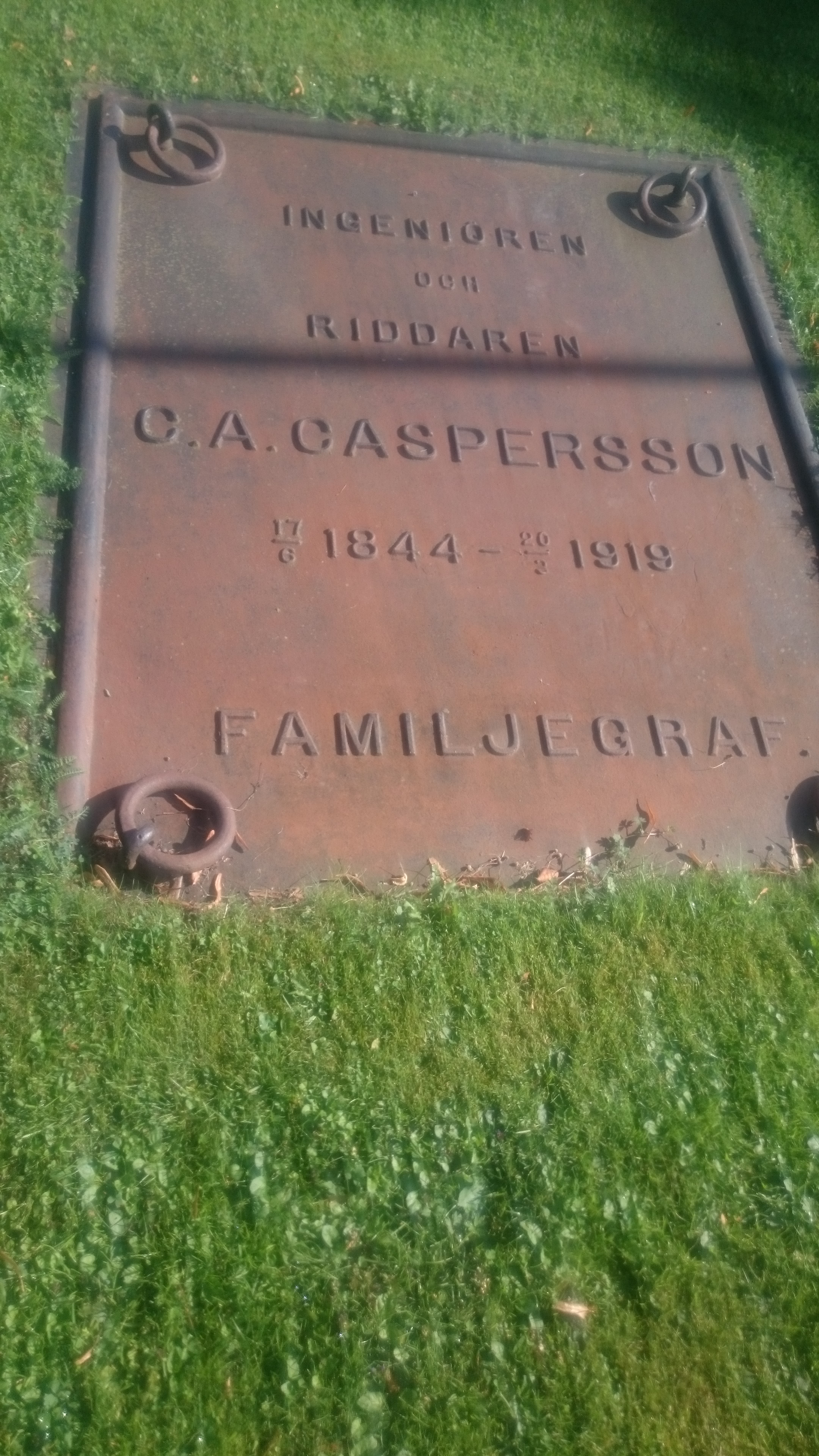 Graf van Carl August Caspersson op de begraafplaats in Degerfors (Zweden)